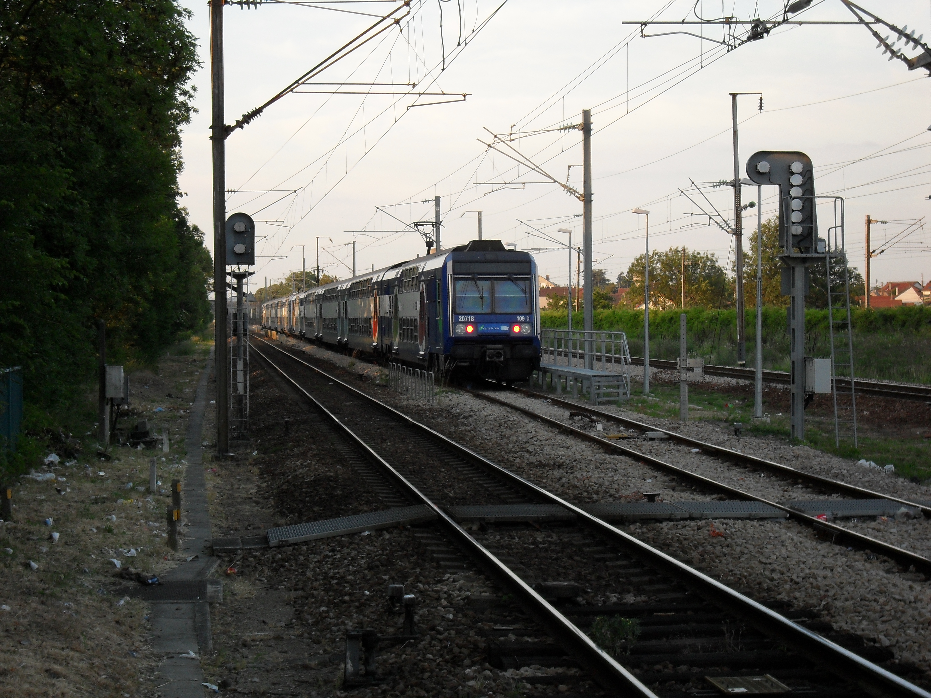 Gare de Goussainville